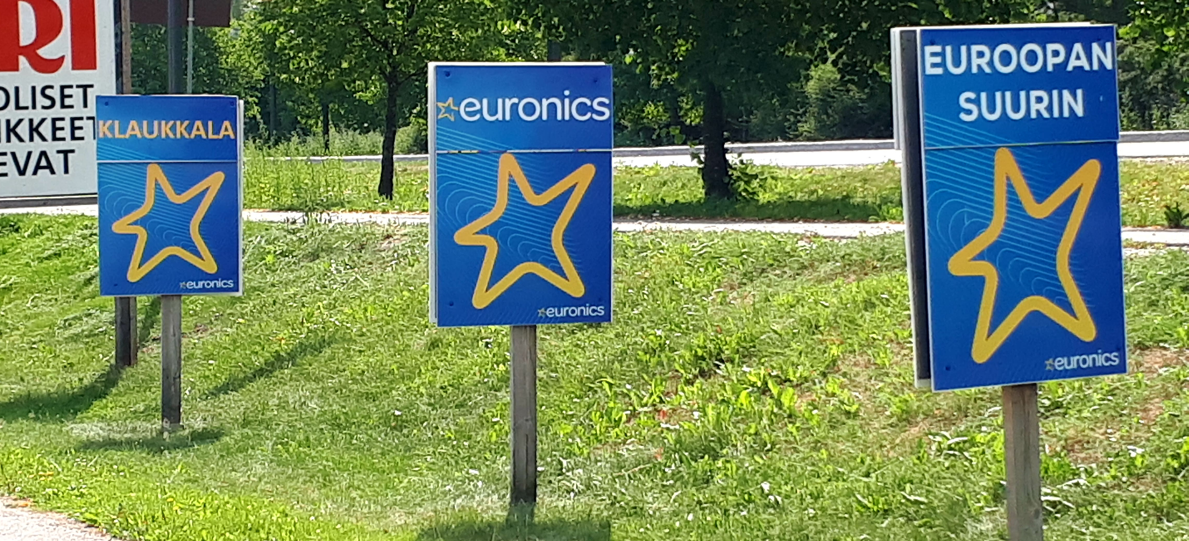 Euronics Klaukkala